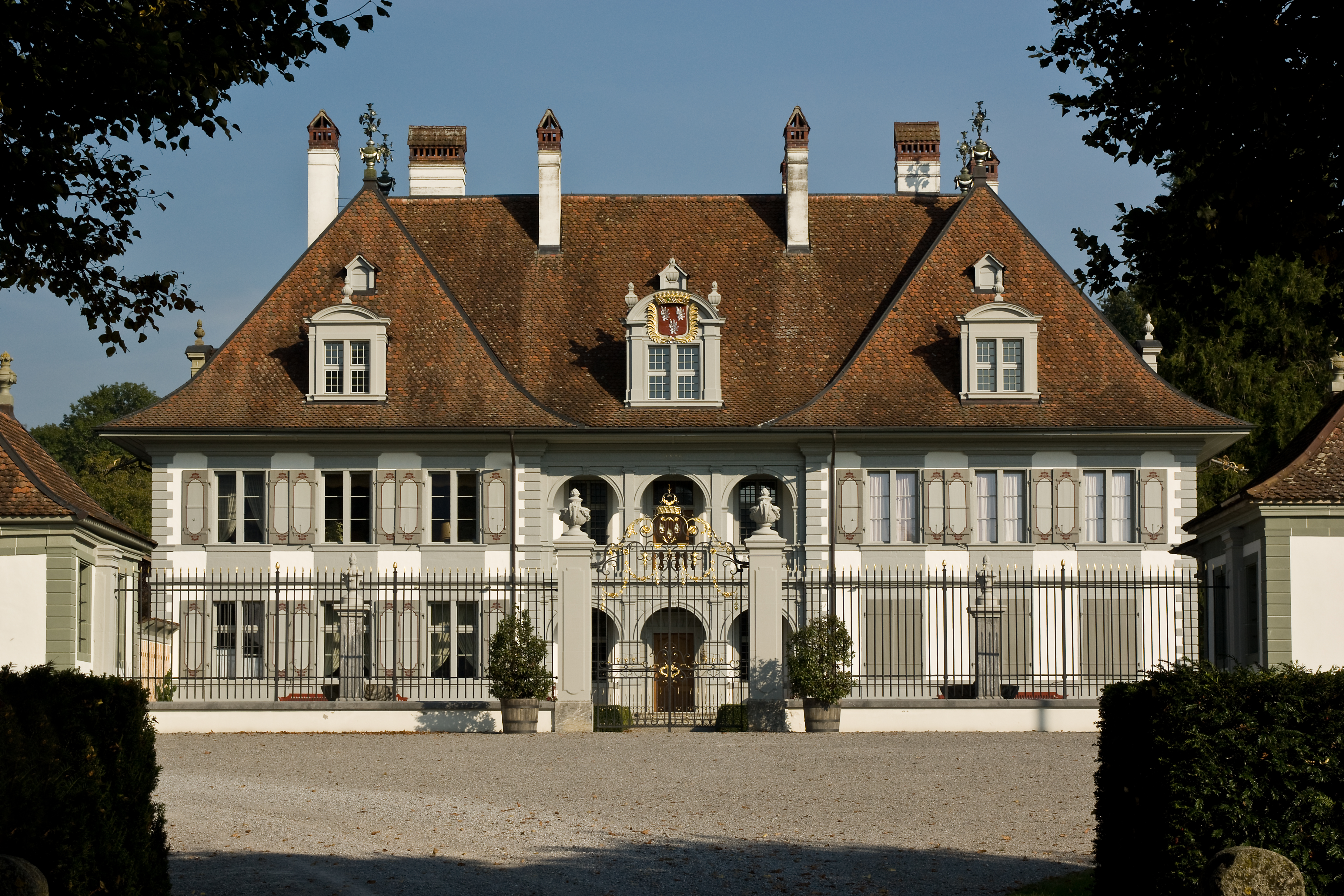 Oberdiessbach BE, Neues Schloss, die eindrückliche, gepflegte Eingangsfront